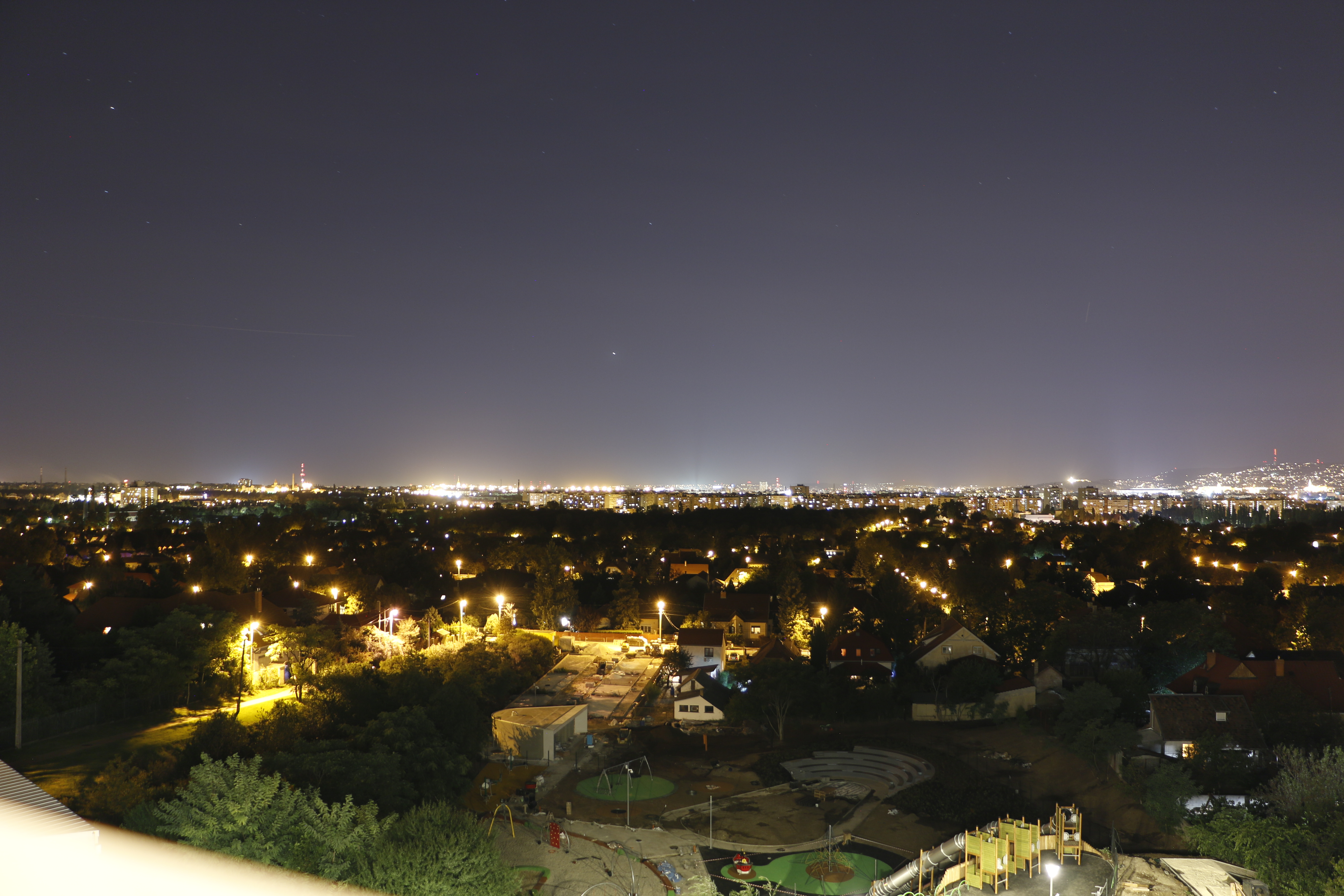 A Reformátorok tere második ütemben megépülő játszóparkja építés alatt és Budapest fényei a kilátóból éjjel, Budapesten, a XVI. kerületi Homokdomb utca felé